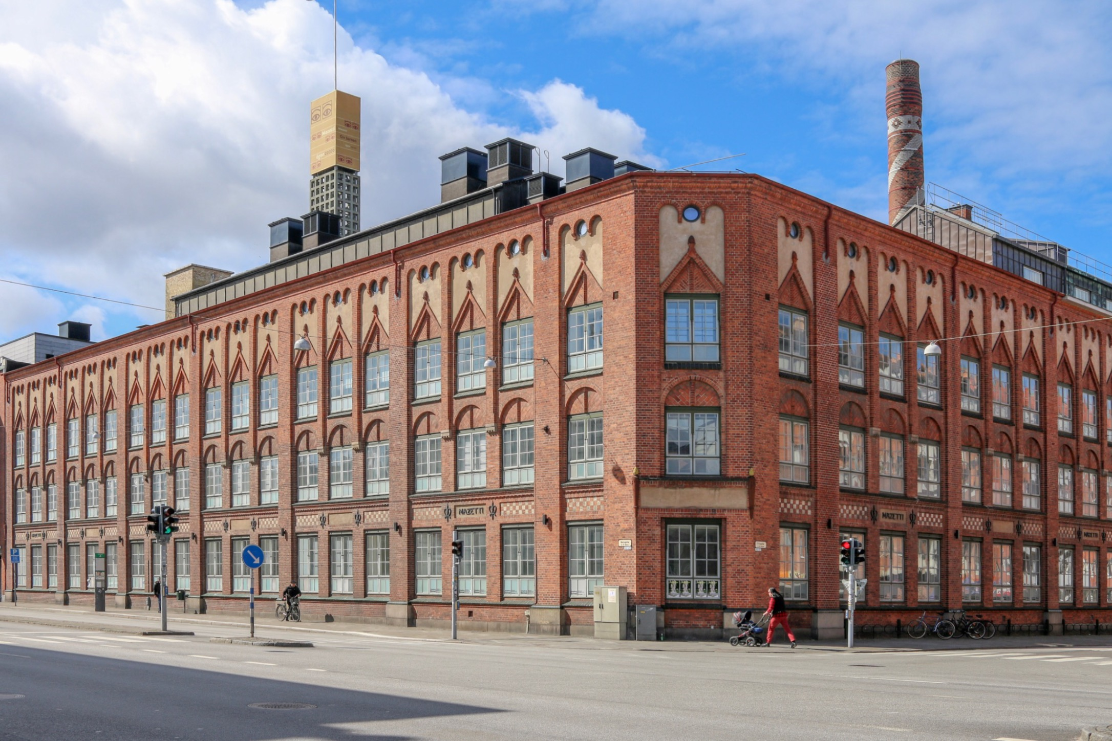 Mazettihuset, Malmö 2017